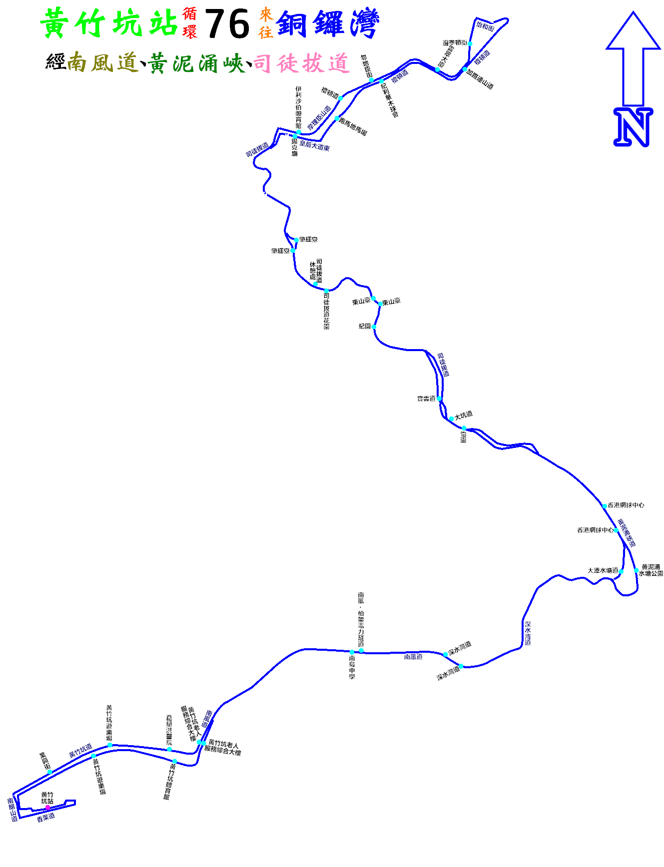 中文（香港）: 城巴76線的走線圖